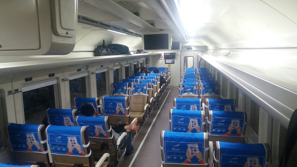 Interior Kereta kelas Premium dari Kereta api Wijayakusuma. Sumber : Nicko Chaerudin Novaliantama, dikirim langsung via Whatsapp resminya untuk pengunggahan.